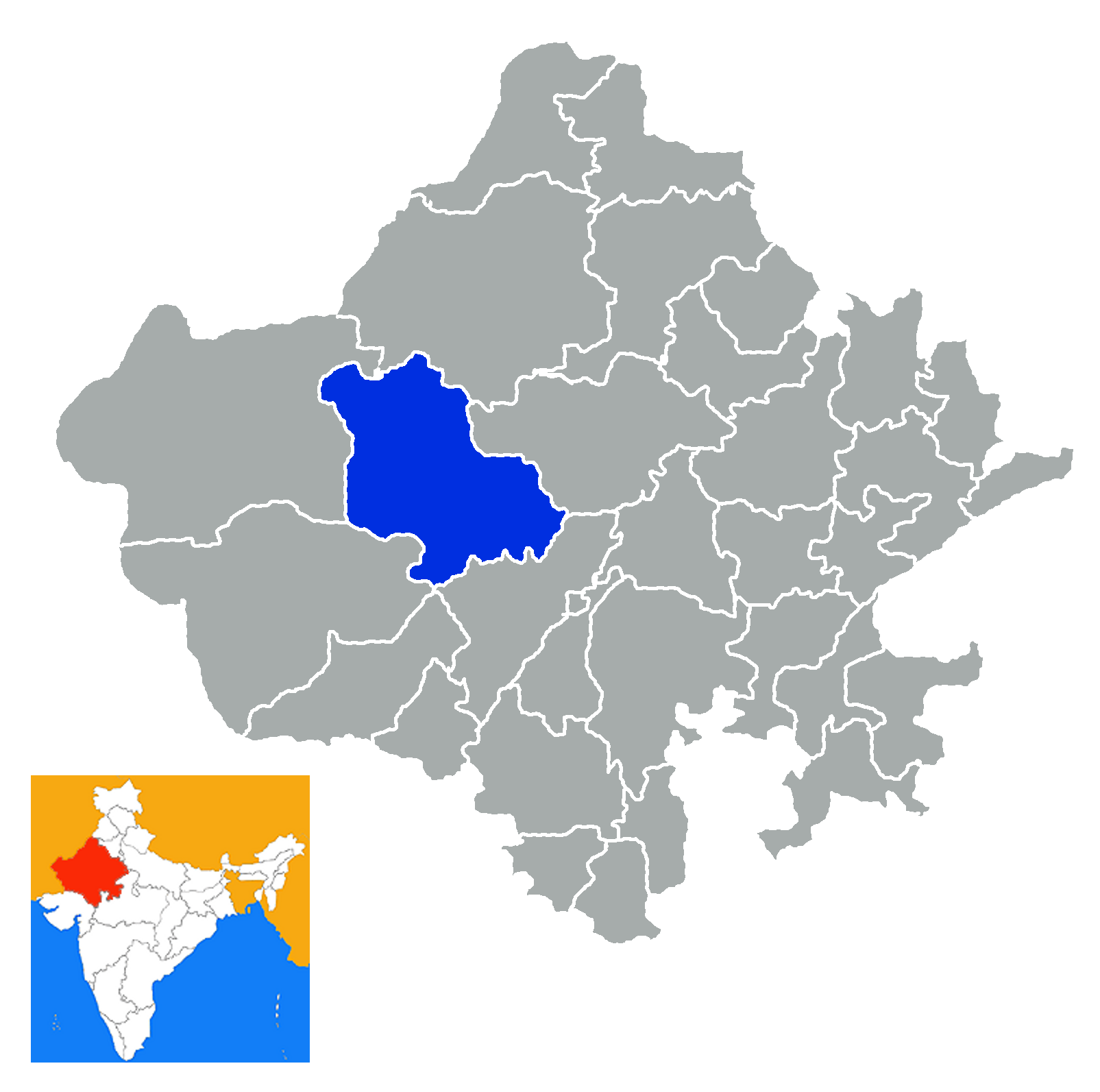 Distrito de Jodhpur Rajastan India